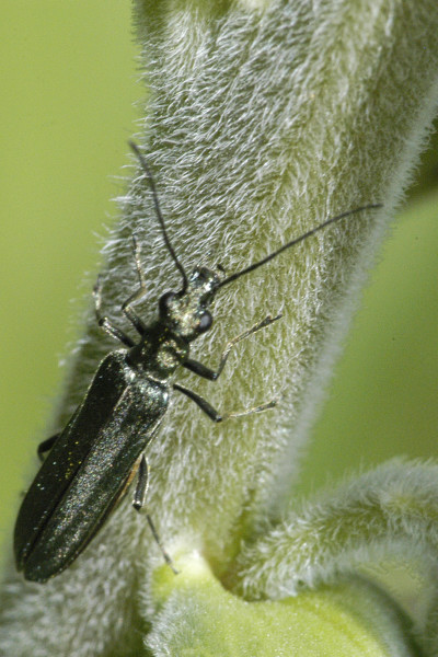 Picture taken in Commanster, Belgian High Ardennes . Species: Oedemera lurida